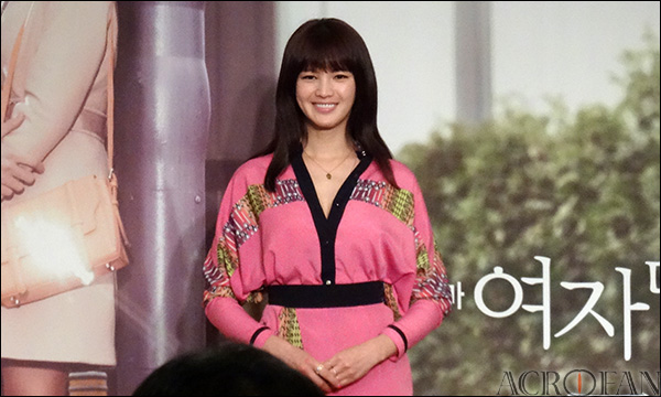 SBS 미니드라마 '여자만화 구두' 제작발표회